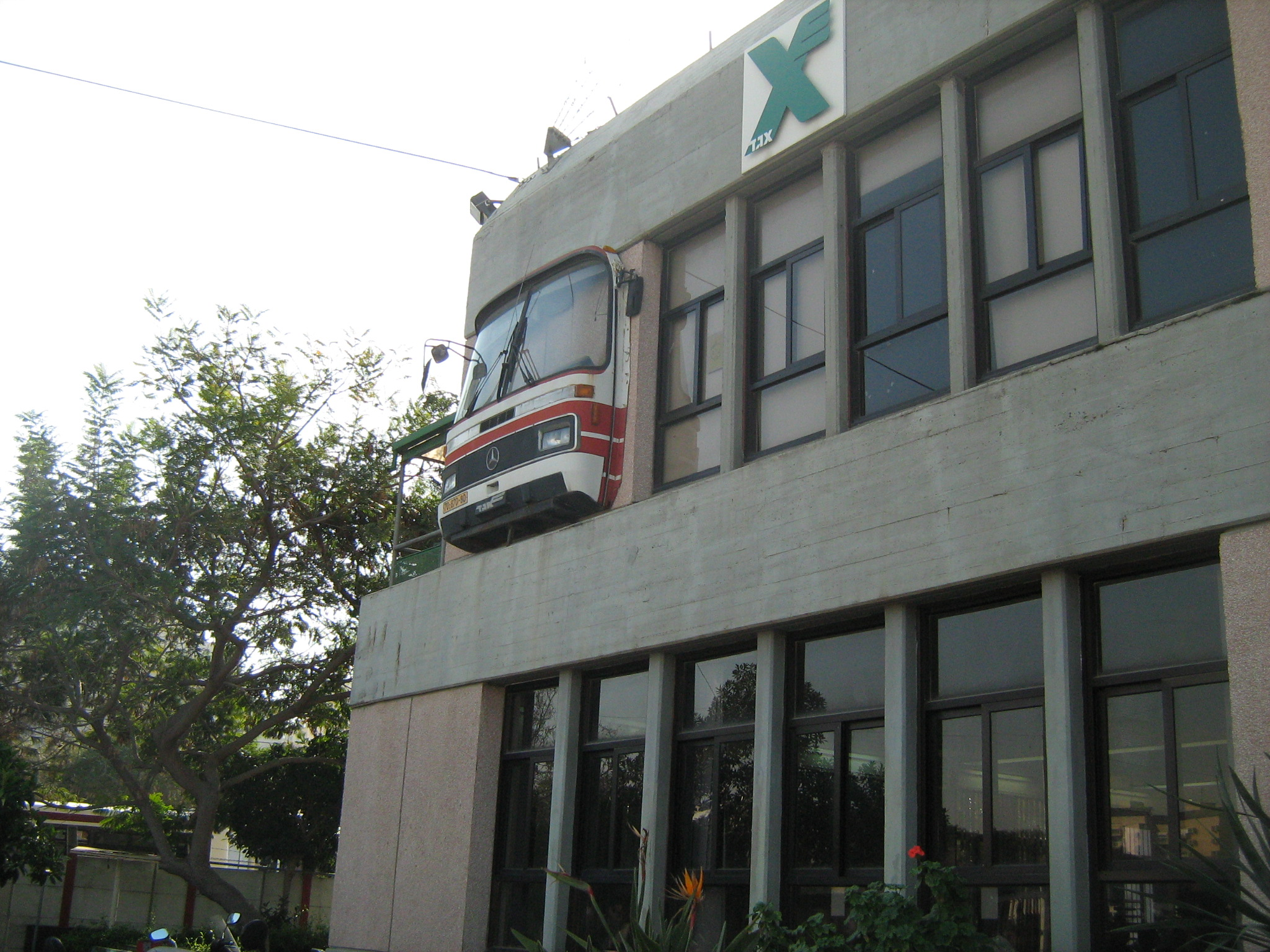 חזית של אוטובוס אגד 303 מתוצרת מרצדס משולבת בבנין אגד בחניון חולון